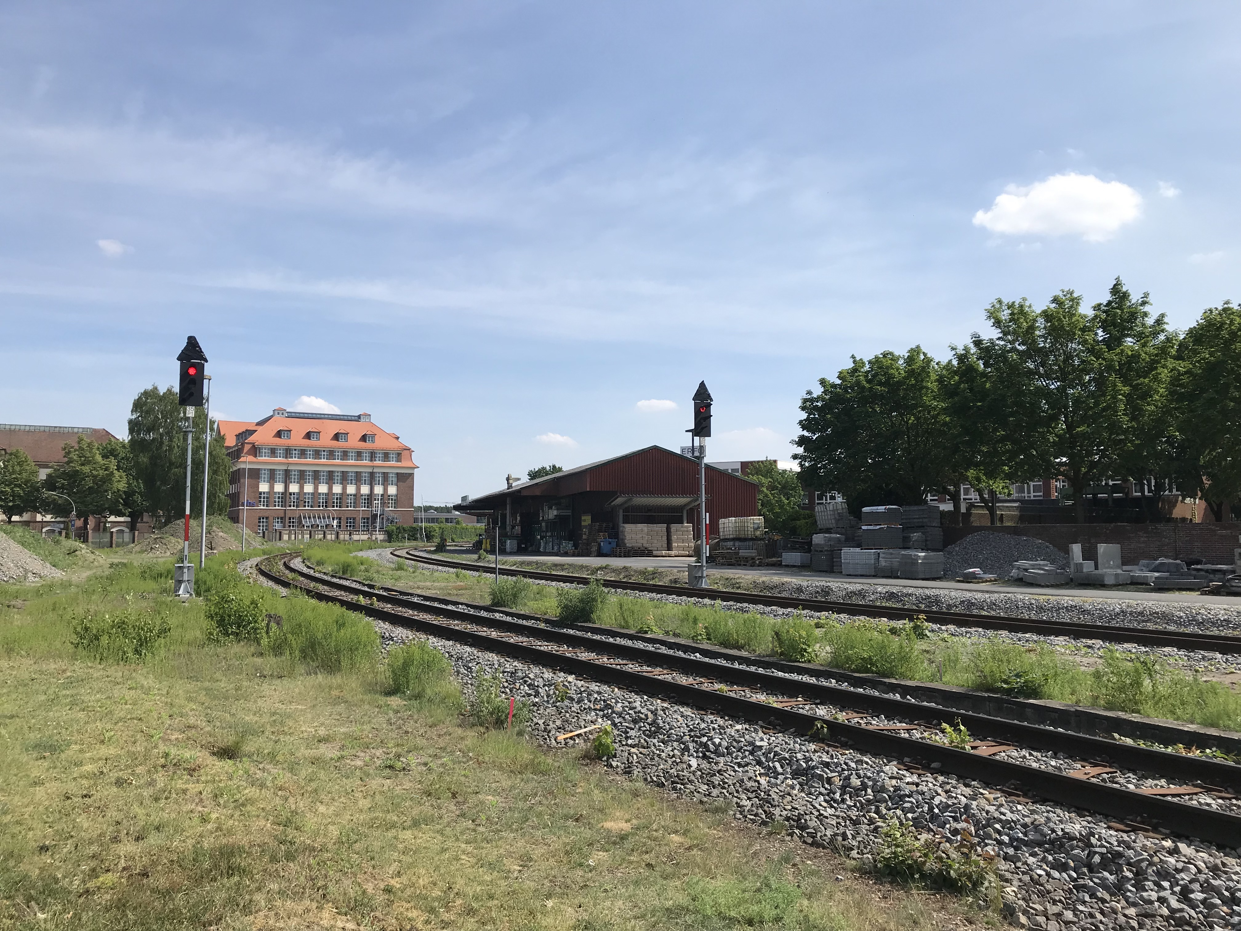 Gleise im Bereich des Bahnhofs von Nordhorn. Im Hintergrund das Gebäude der Volkshochschule.